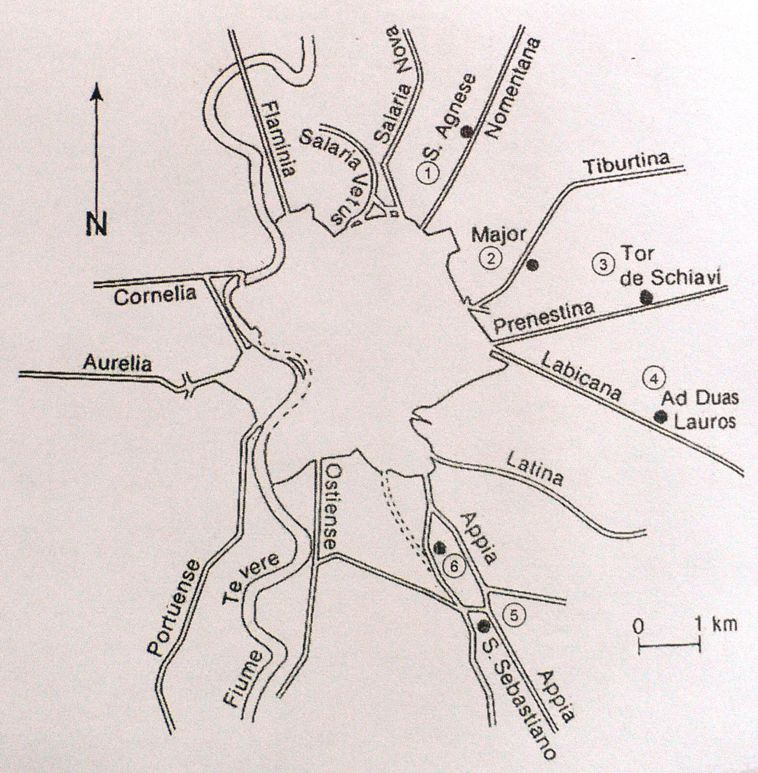 Rom-Karte mit den Ausfallstraßen auf der Ostseite der Stadtmauer